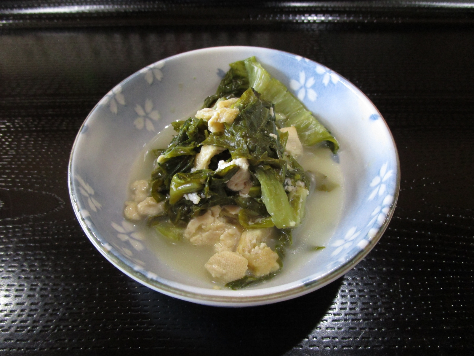 まんばのけんちゃん（香川県高松市、お食事処 はる膳より撮影）